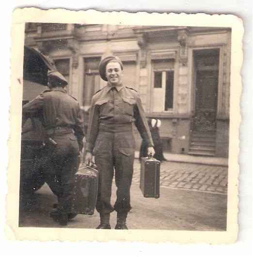 נתן כוגן חייל בבריגדה היהודית